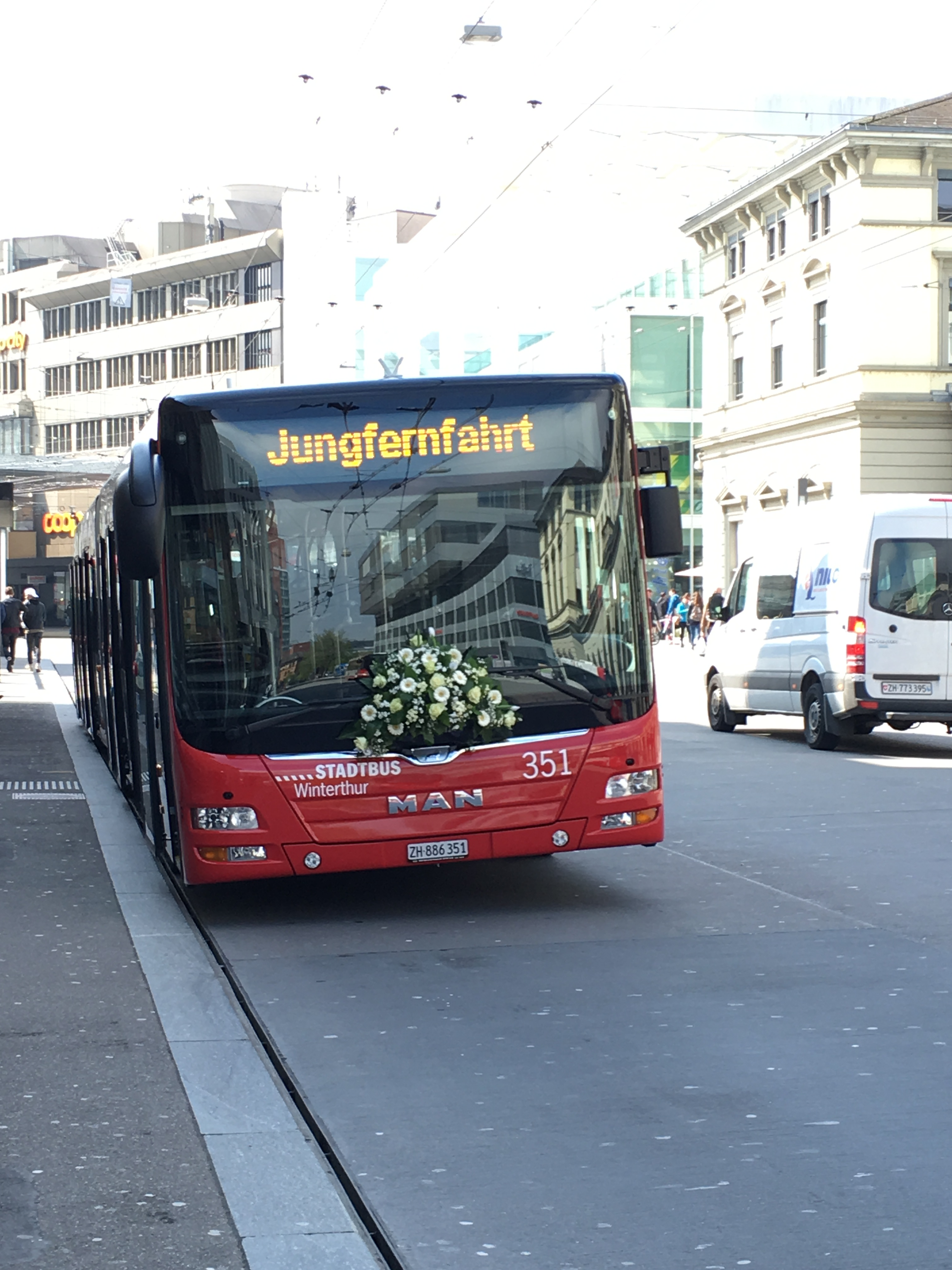 Der neue Stadtbus, MAN Lion's City auf der Jungfernfahrt.